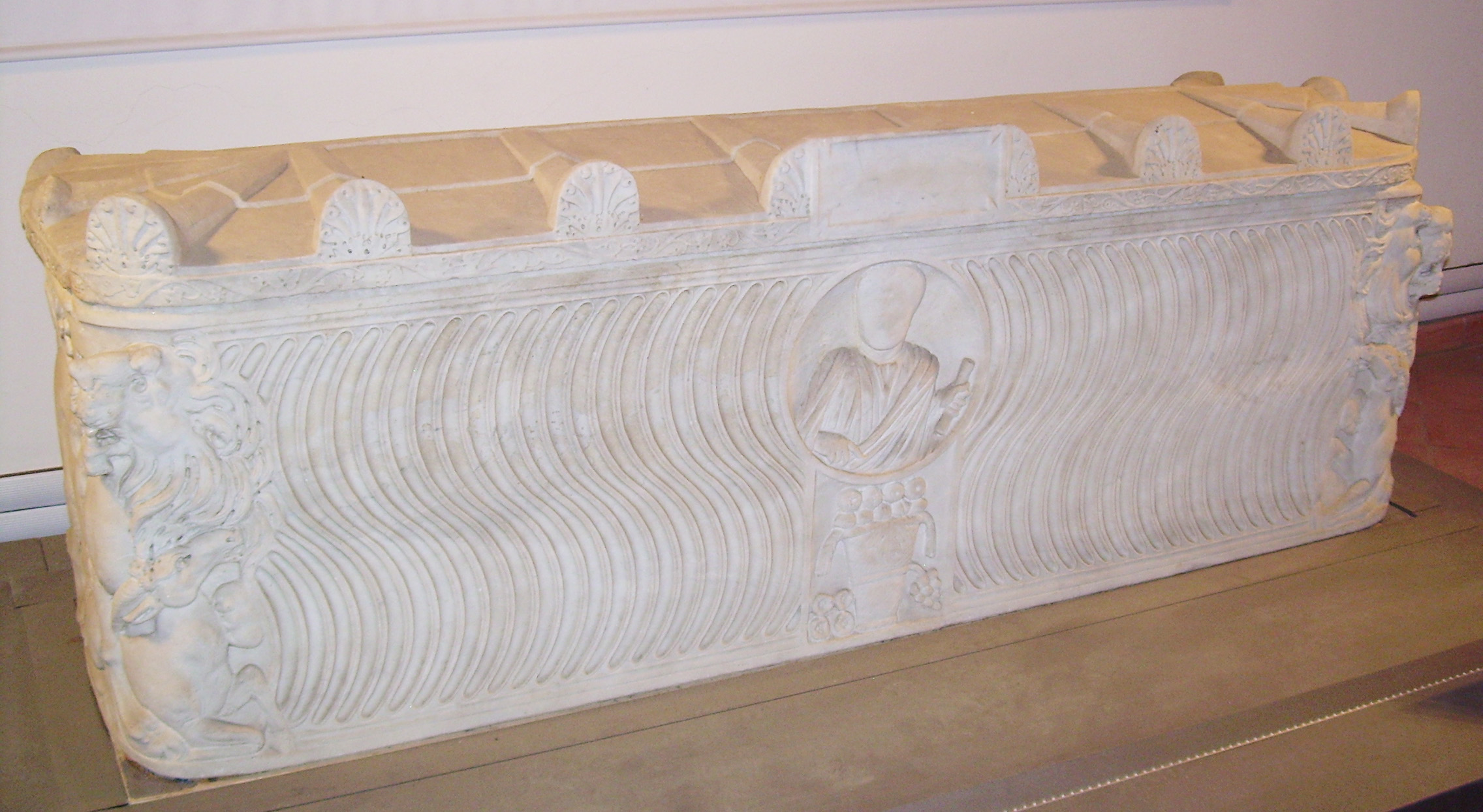 Valmontone, sarcofago romano